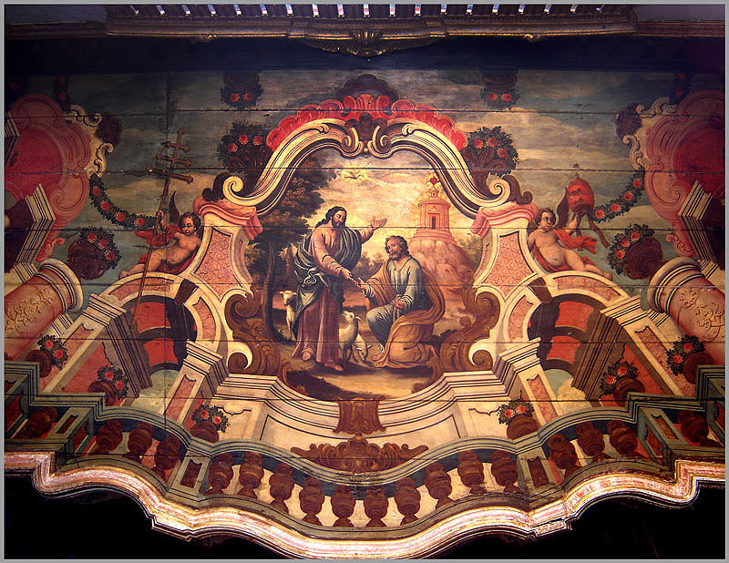 Pintura de Manuel de Jesus Pinto no forro da Concatedral de São Pedro dos Clérigos, em Recife, Pernambuco, Brasil. No medalhão vemos Cristo e São Pedro no momento da fundação da Igreja Cristã.